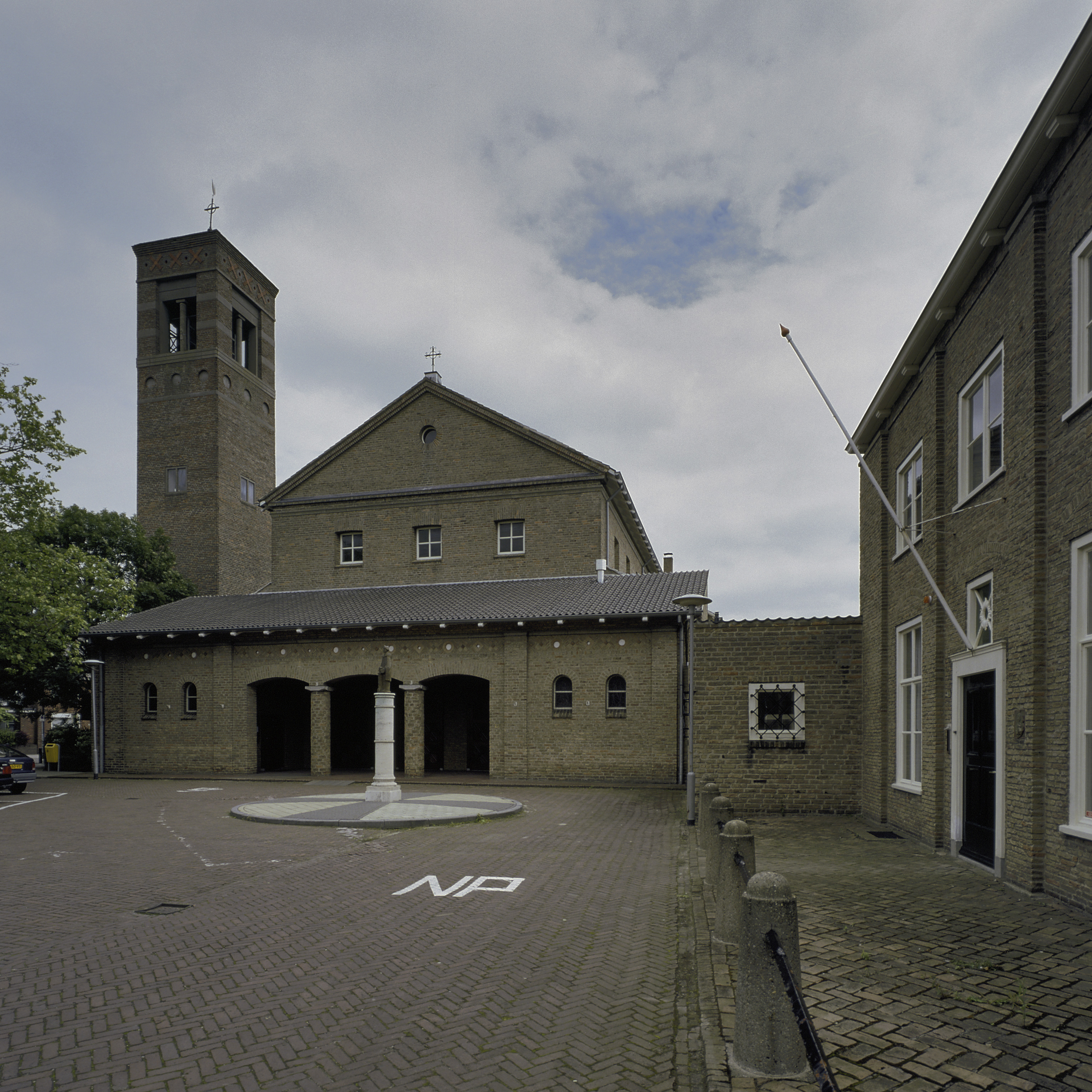 Voormalig Rijkskantorengebouiw Annex Kantongerecht: Overzicht van de westgevel met kerktoren (opmerking: Gefotografeerd voor Toonbeelden van de Wederopbouw - Oostburg, Sint Eligiusplein 10 - Eligiuskerk - anno 1949)